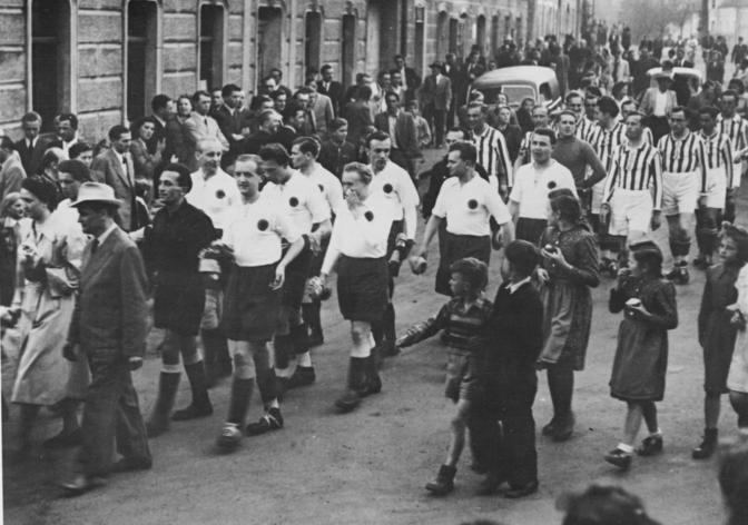 Zentralbild-Götz Hei-Qu. 25.4.52. Gesamtdeutsches Sportereignis in Pleystein (Oberpf.). Kürzlich besuchte - von der westdeutschen Bevölkerung mit grosser Herzlichkeit empfangen - eine Fussballmannschaft der BSG Einheit-Ost Leipzig das Städtchen Pleystein in der Oberpfalz, um ein Fussballspiel gegen den Sportverein TSV-Pleystein durchzuführen. Der Ort zählt 2000 Einwohner - 800 waren aus Zuschauer auf dem Fussballplatz. Bei der Ankunft der Gäste aus der DDR waren in der Nacht 700 Einwohner auf dem Bahnhof versammelt, um die Gäste zu empfangen. UBz. Die beiden Mannschaften, voraus die Leipziger Fussballmannschaft unter Musikbegleitung und dem Jubel der Bevölkerung auf dem Weg vom Vereinslokal zum Sportplatz in Pleystein.